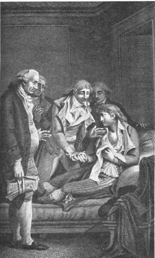 Illustration pour le roman de Pierre Choderlos de Laclos' Les Liaisons dangereuses Lettre 143 Le Vicomte mourant